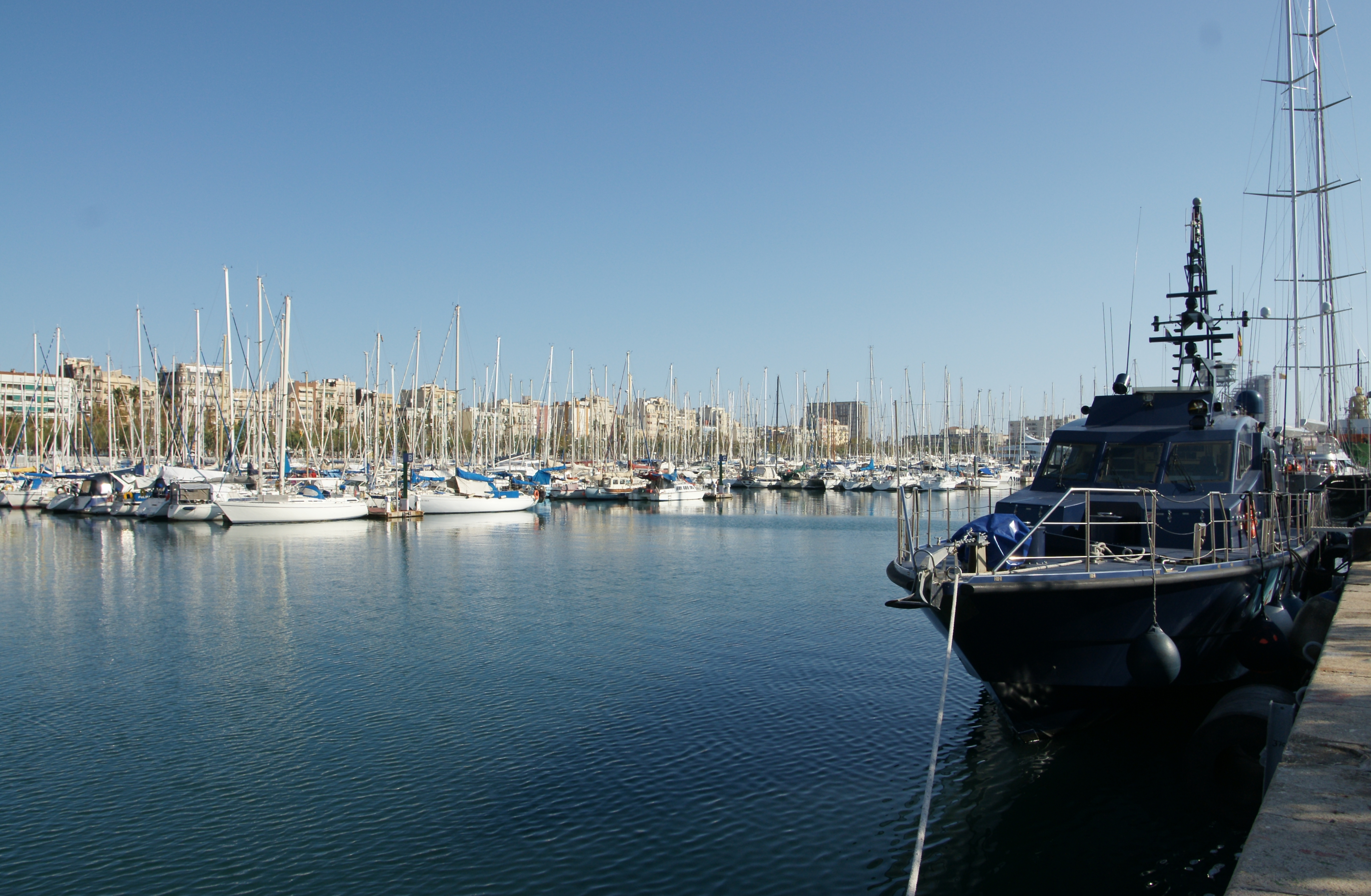 Das Hafengelände "Port Vell" im 1. Bezirk (Ciutat Vella) von Barcelona.